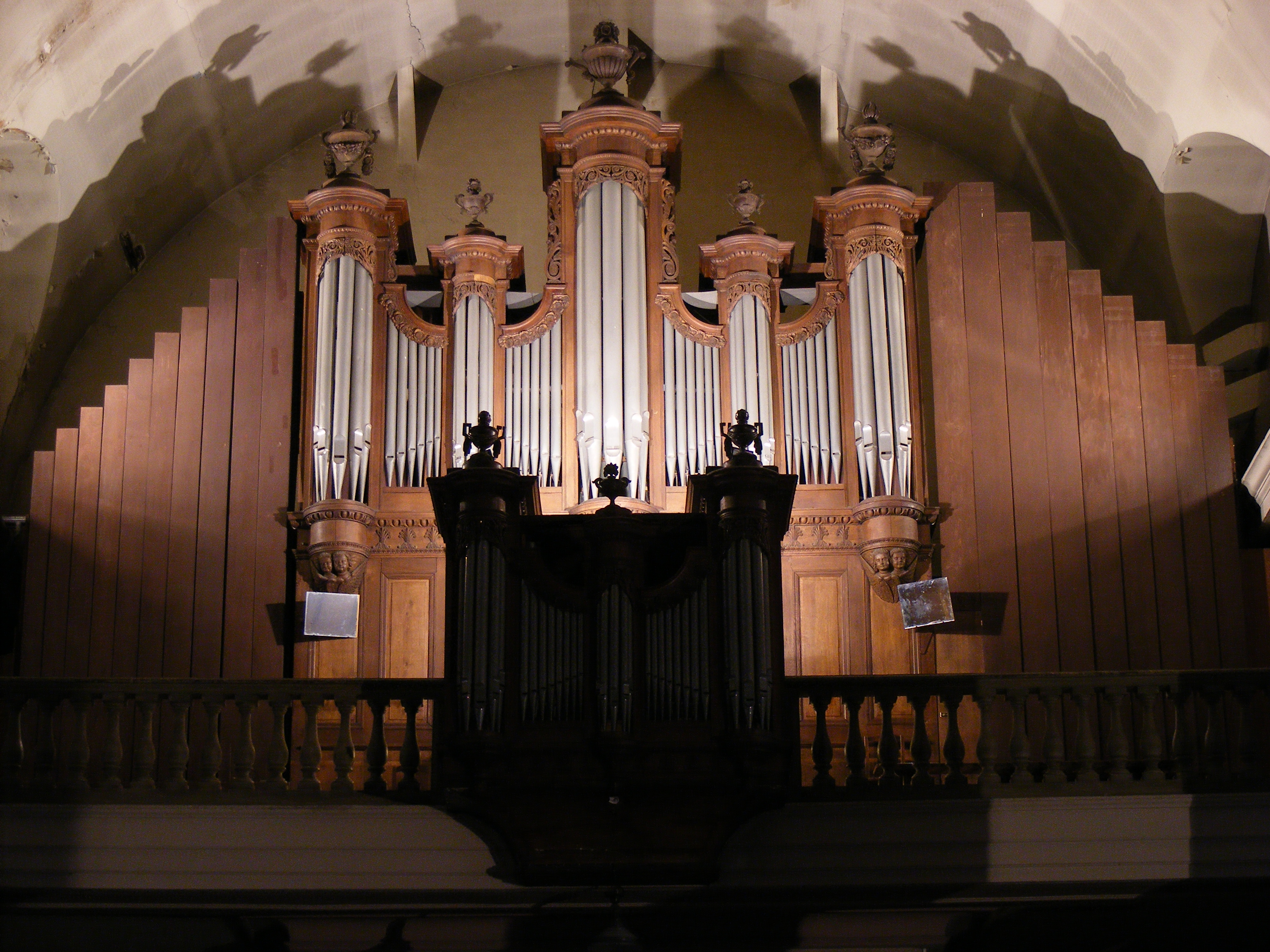 Mâcon (Saône-et-Loire, France), cathédrale Saint Vincent, instrument entièrement reconstruit en 1897 par Charles DIDIER-VAN CASTER dans le buffet de 1841 de l'orgue des frères Callinet.